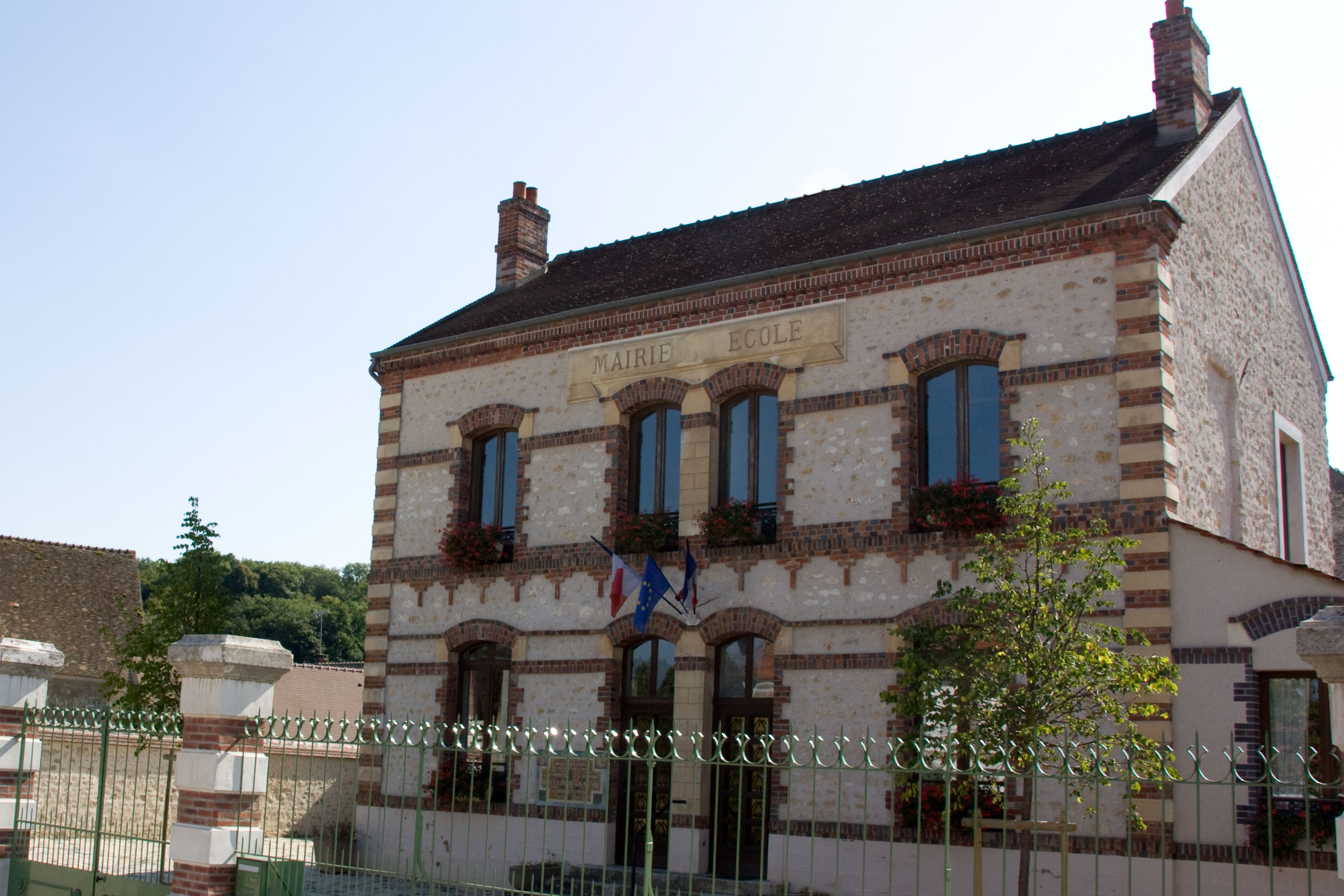 Mairie de Videlles, Videlles, Essonne, France